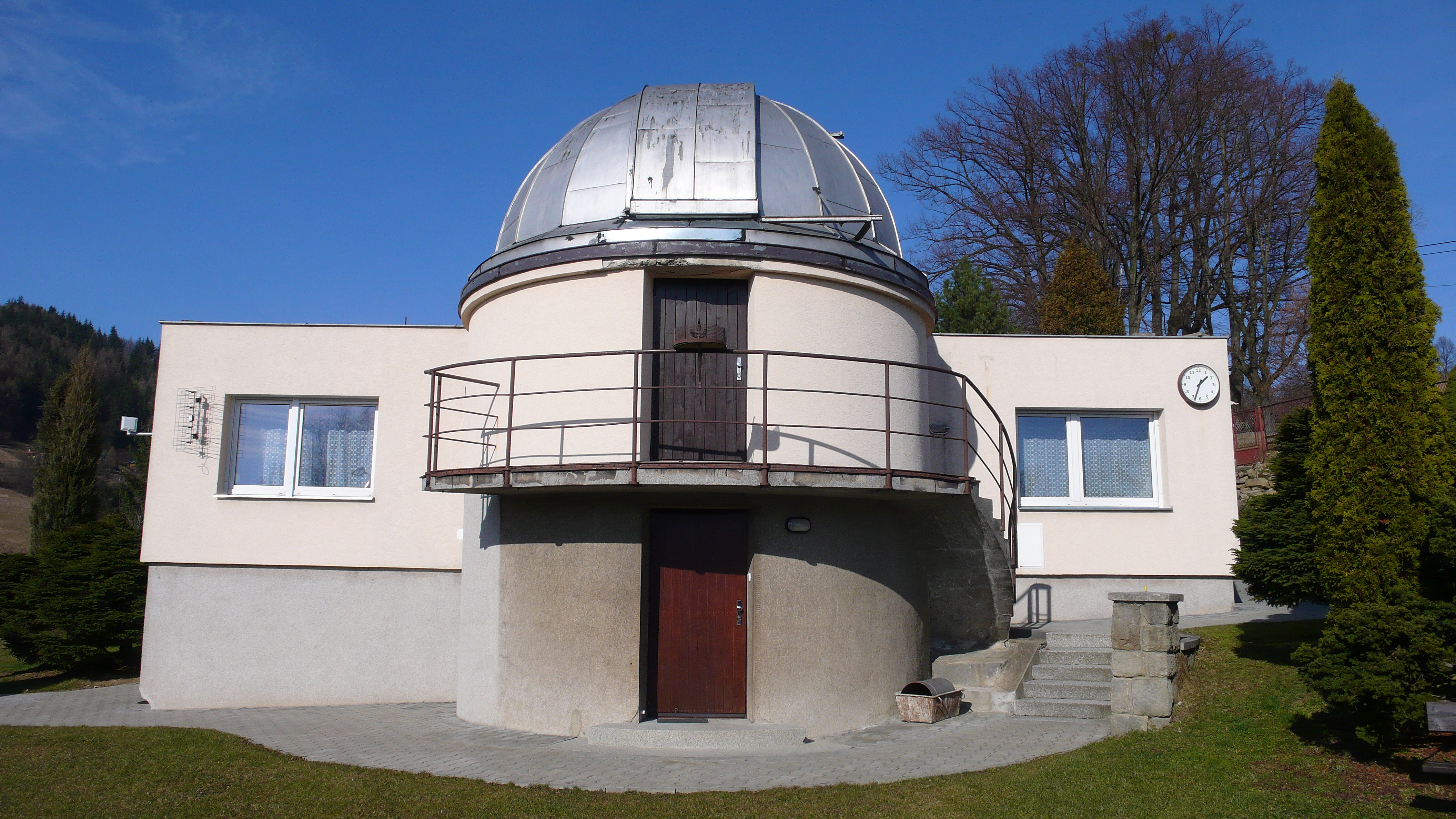 Pohled na jižní stranu hlavní budovy Vsetínské hvězdárny.